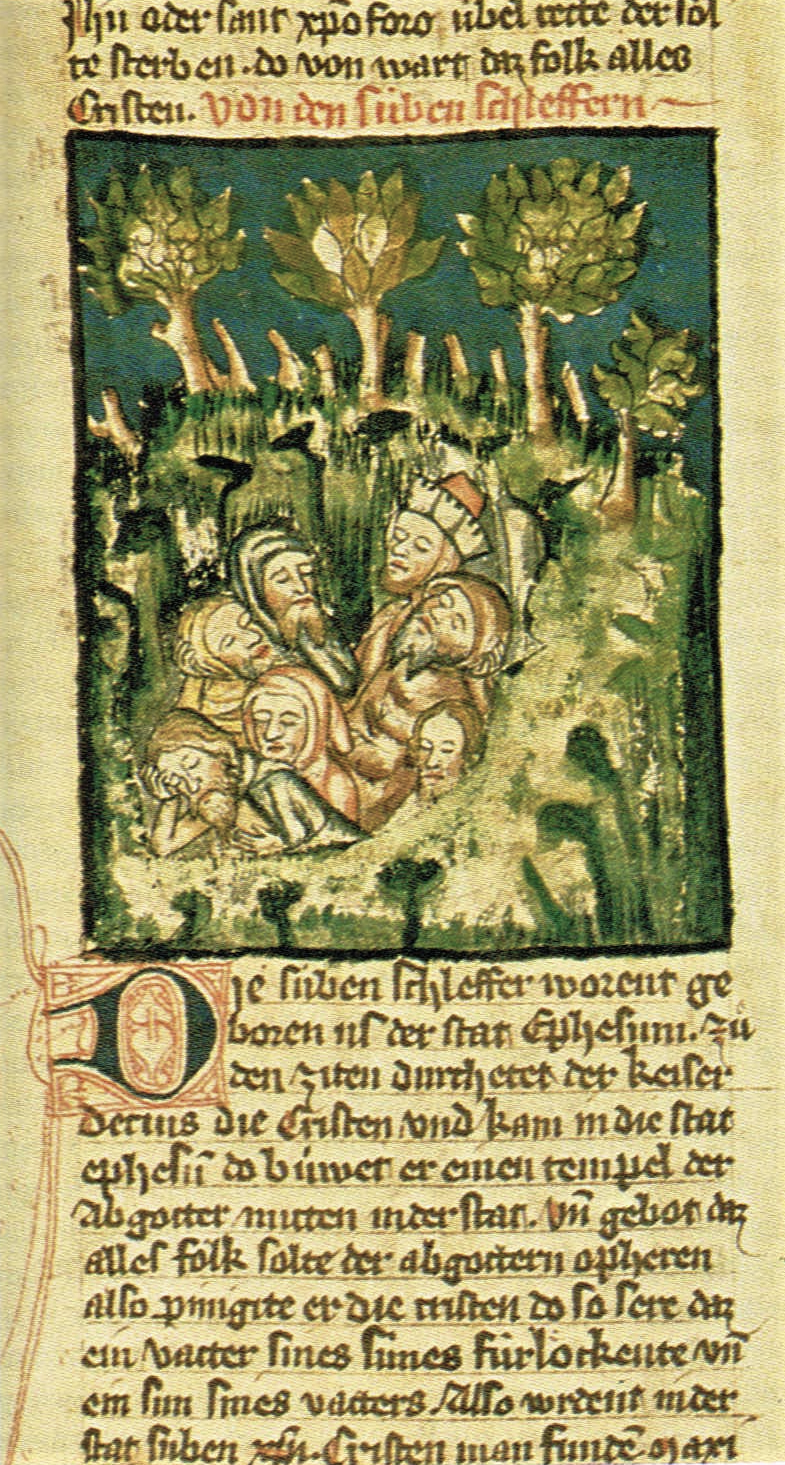 Illustrierte Handschrift mit Beschreibung der Legende (37,6 x 26,6 cm)